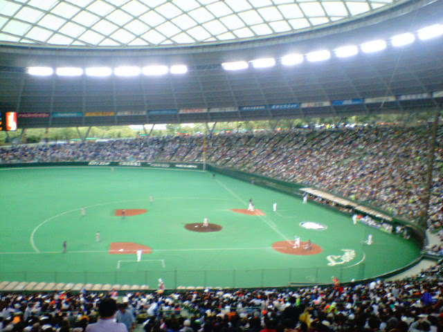 2004年10月20日 (水) 15:47 . . Goki . . 640×480 (51,395 バイト) (西武ドーム 撮影日:2004年10月3日 撮影者本人 GFDL )